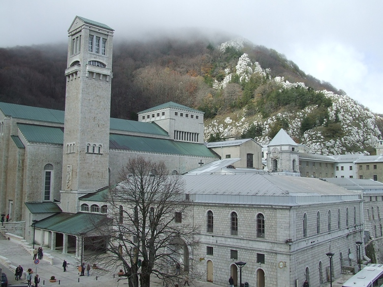 Vista esterna del Santuario di Montevergine